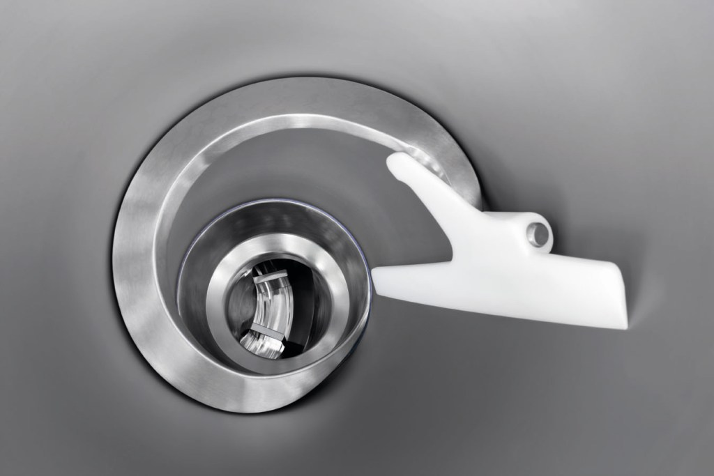 Zuführung